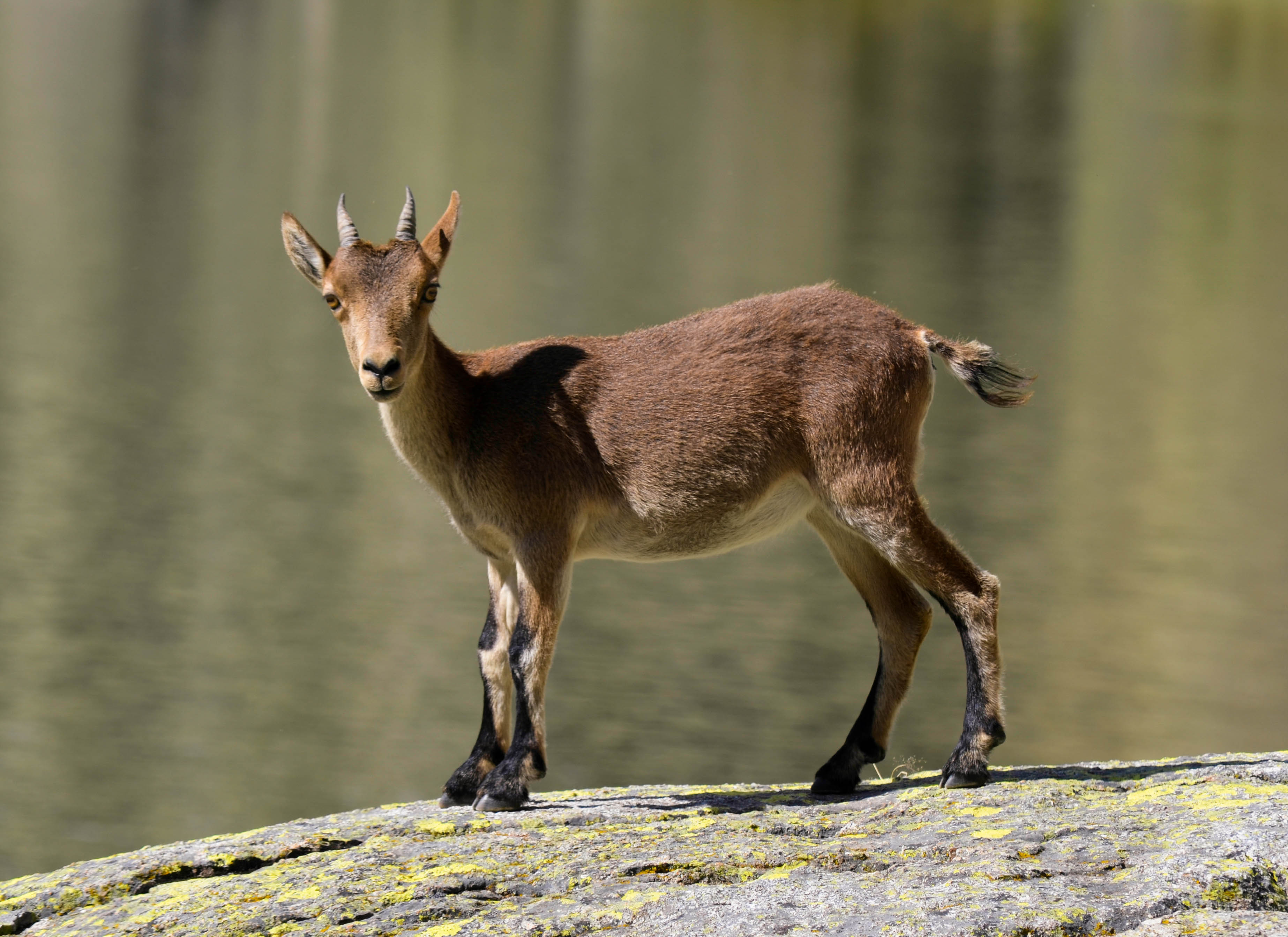 Íbice ibérico (Capra pyrenaica victoriae) hembra, en la Laguna Grande de Gredos